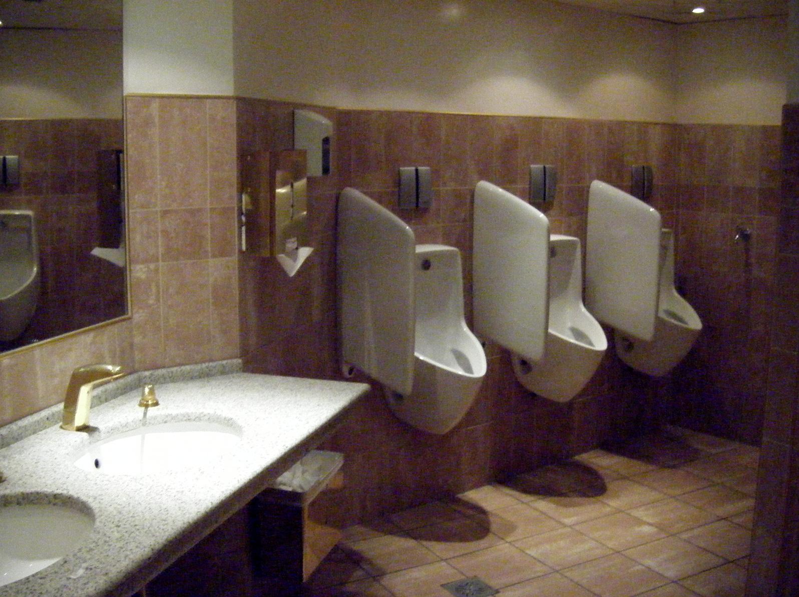 Palais Ferstel